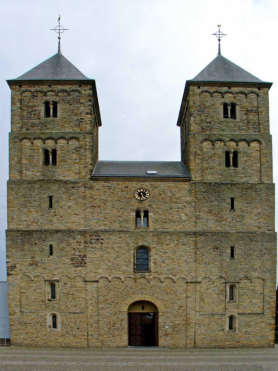 Sint Amelbergakerk in Susteren (Limburg)